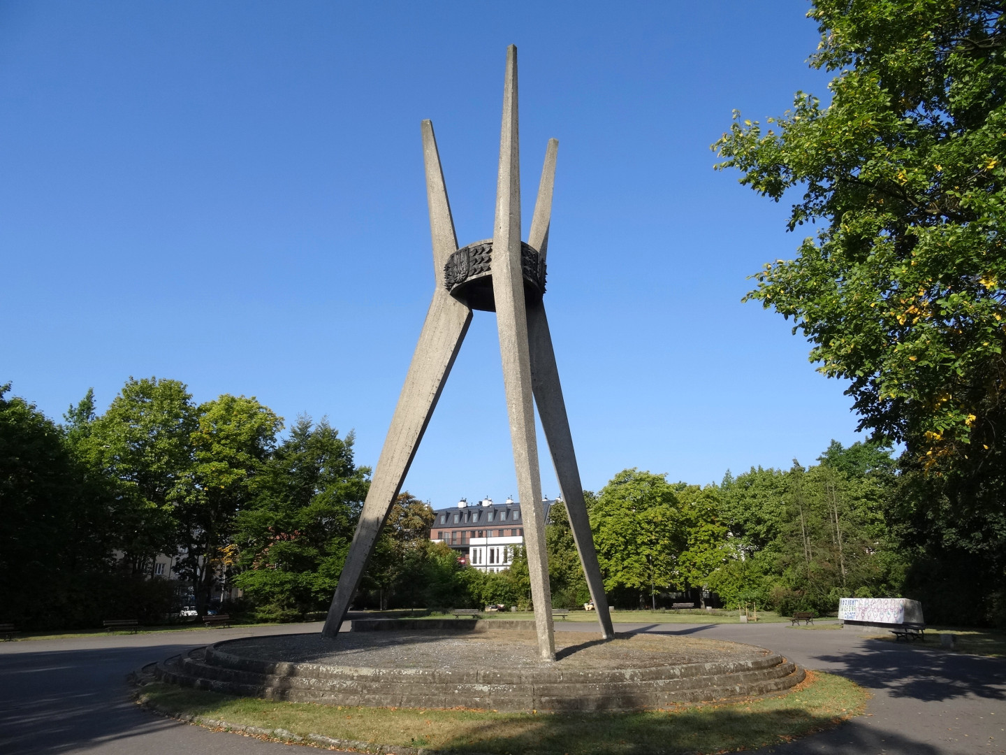 Pomnik Tysiąclecia Państwa Polskiego (niedokończony) autorstwa Stanisława Lejkowskiego, 1967